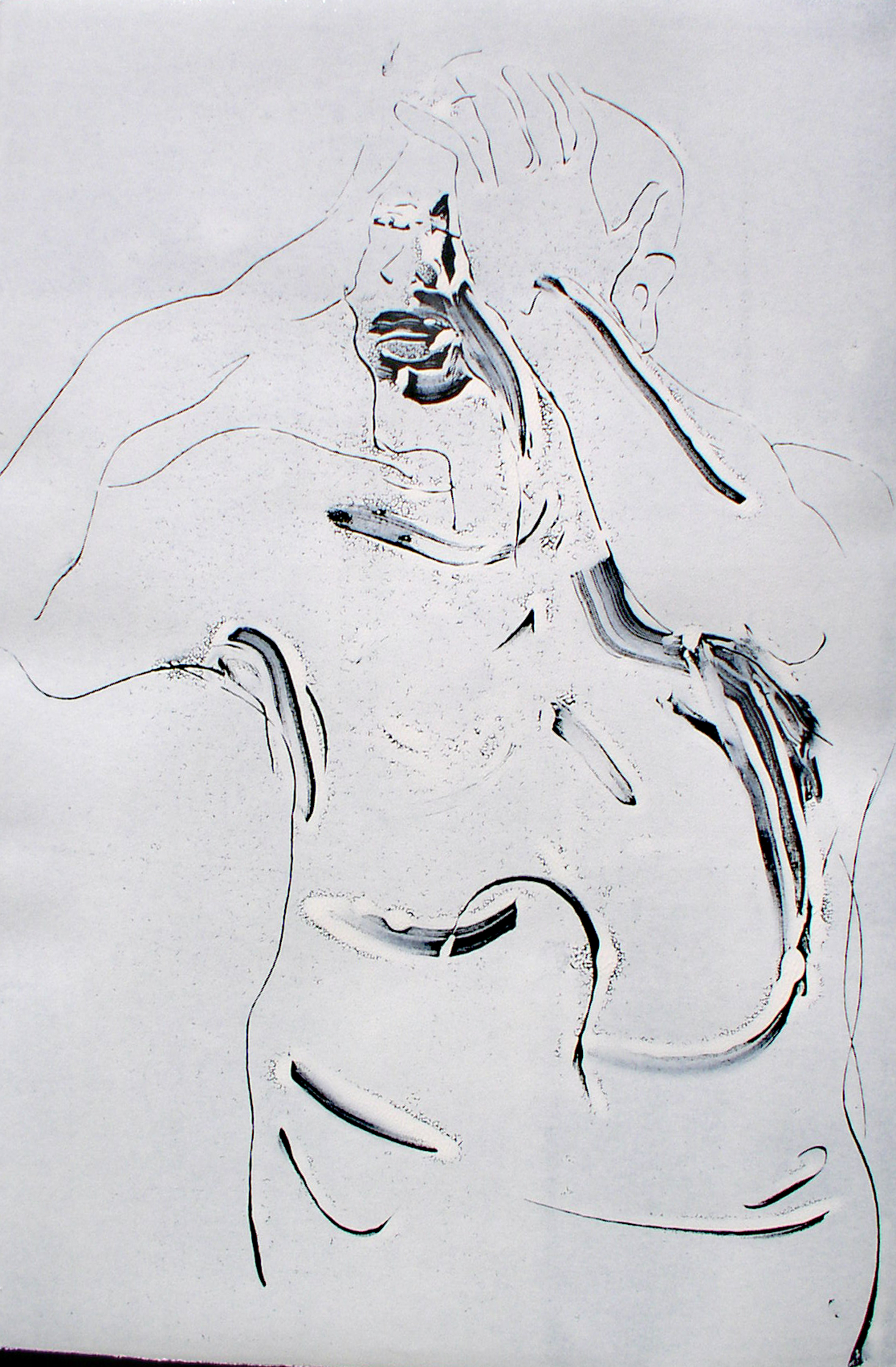 Eine Monotypie, die der Bildhauer Peter Marggraf für die Kassette "Woyzeck" gedruckt hat.